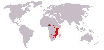 Bewerking afbeelding: Afbeelding_(kaart).JPG